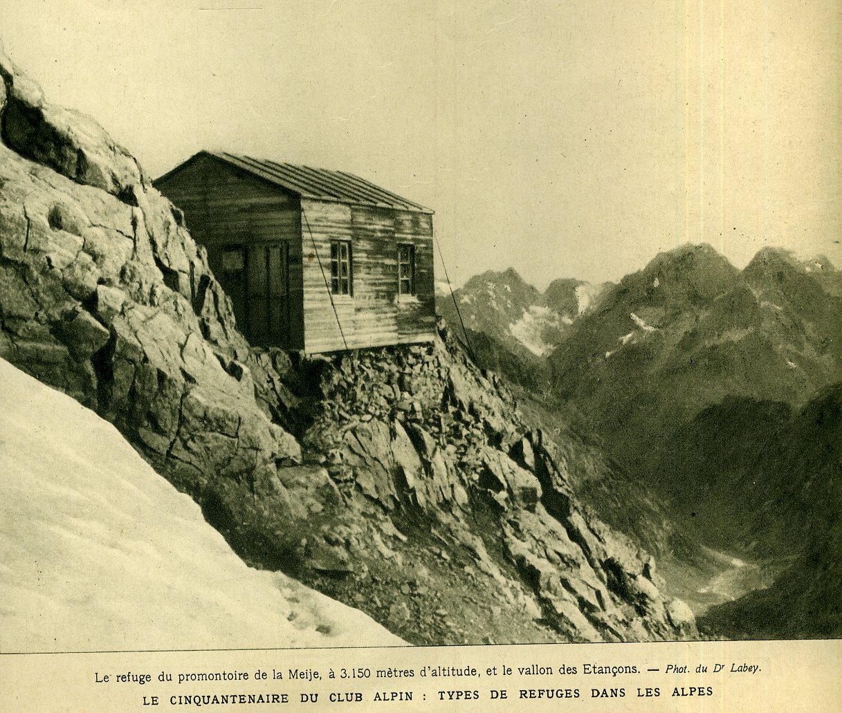 see picture